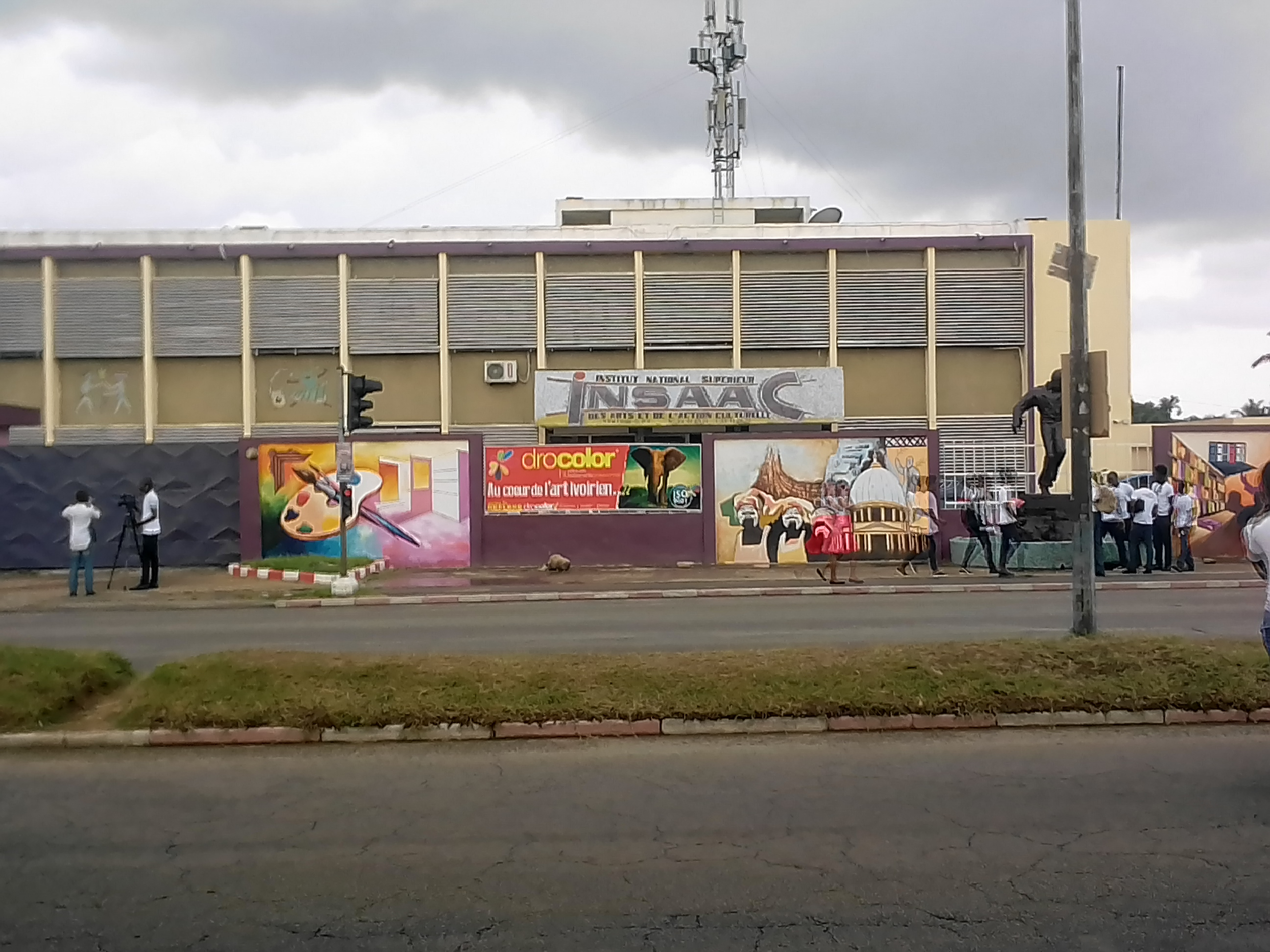 Ce fichier a été pris en accord avec Mathilde Moreau, directrice de l'école des beaux-arts d'Abidjan. C'est l'institut national supérieur des arts et de l'action culturelle (INSAAC) situé à Cocody près de l'Université Félix Houphouët-Boigny. Elle donne sa permission pour la diffusion de ce fichier sous licence libre.